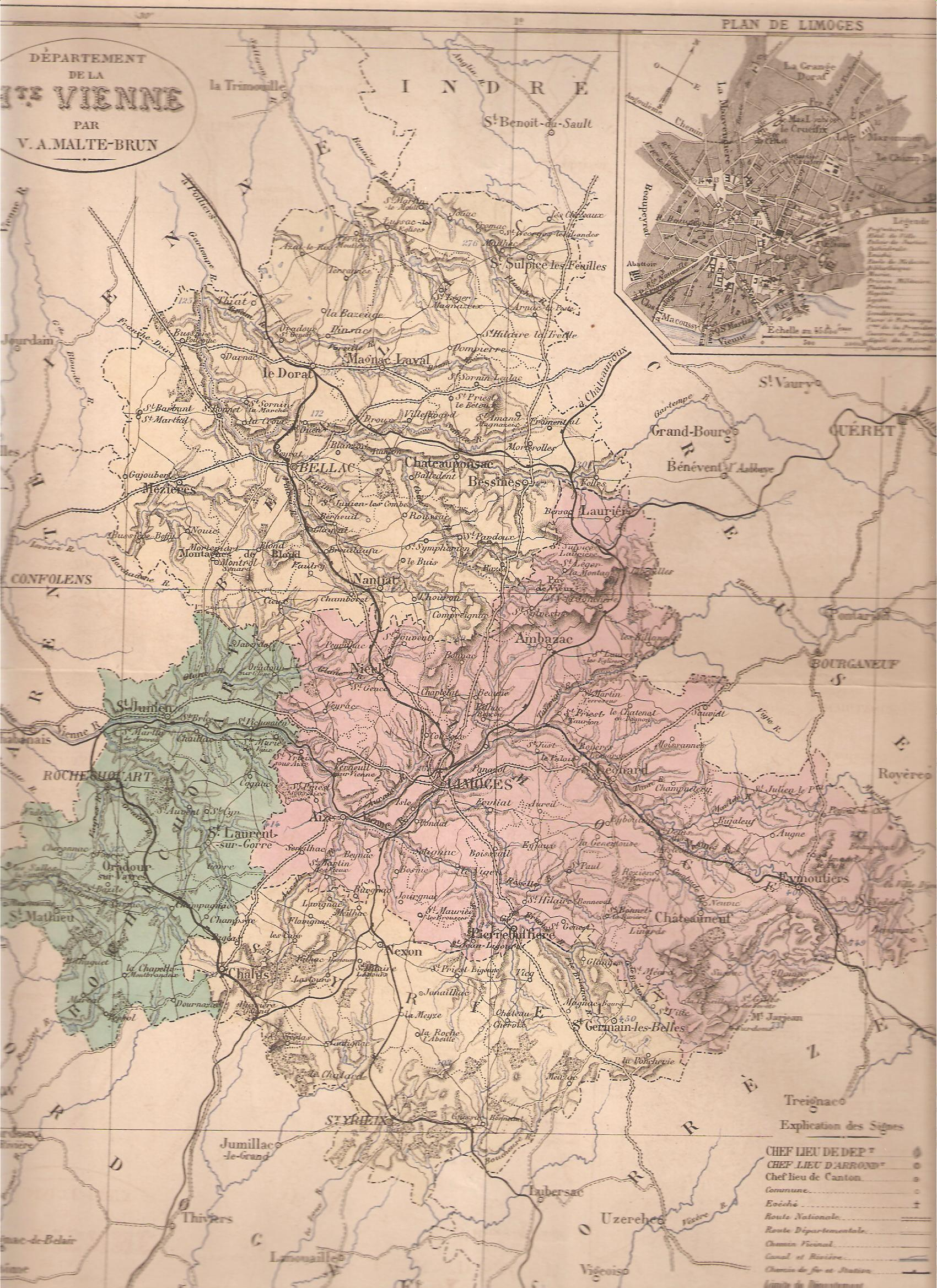 Carte de la Haute-Vienne, réalisée en 1853 par V.A. Malte-Brun (1816-1889)